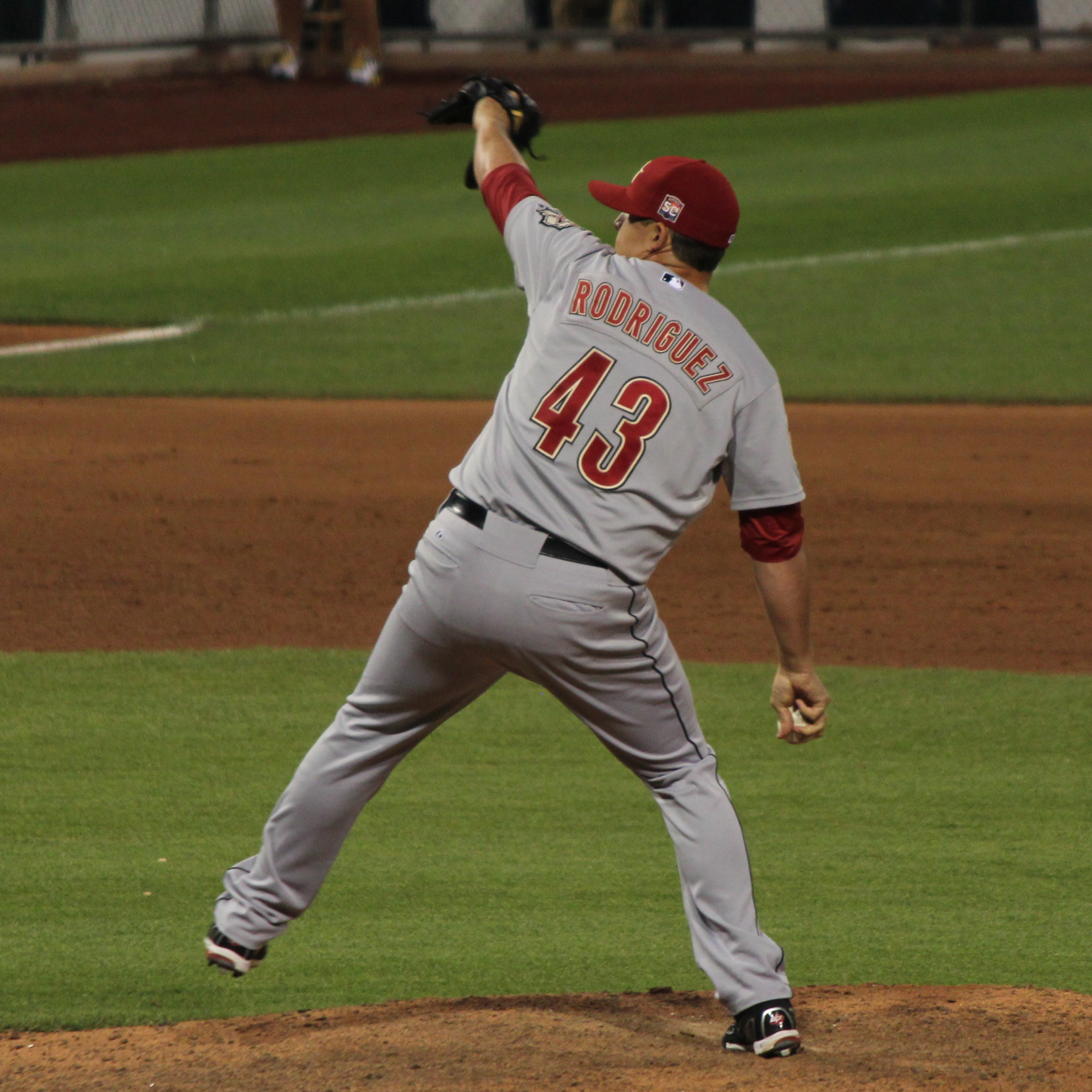 Fernando Rodriguez